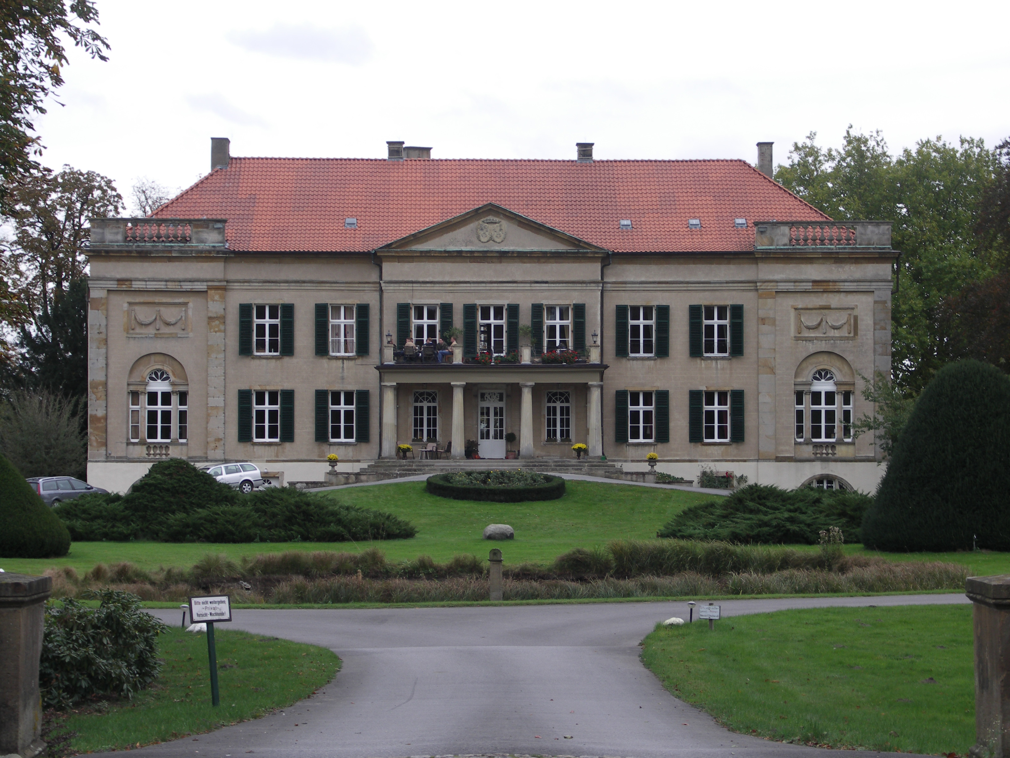 Schloß Harkotten near Sassenberg, Germany